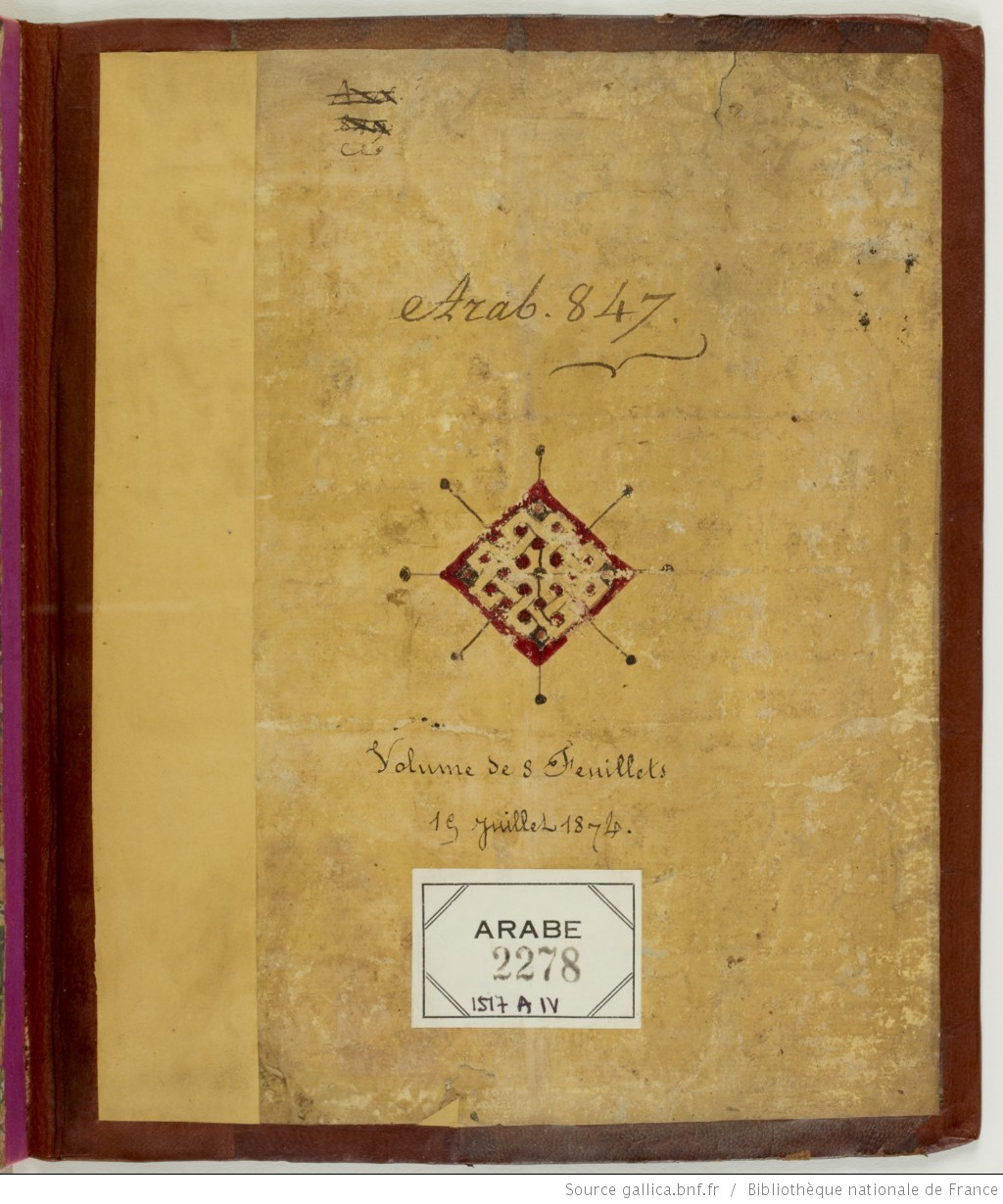 كتاب الطبلة